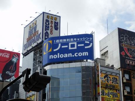 noloan靖国通り看板